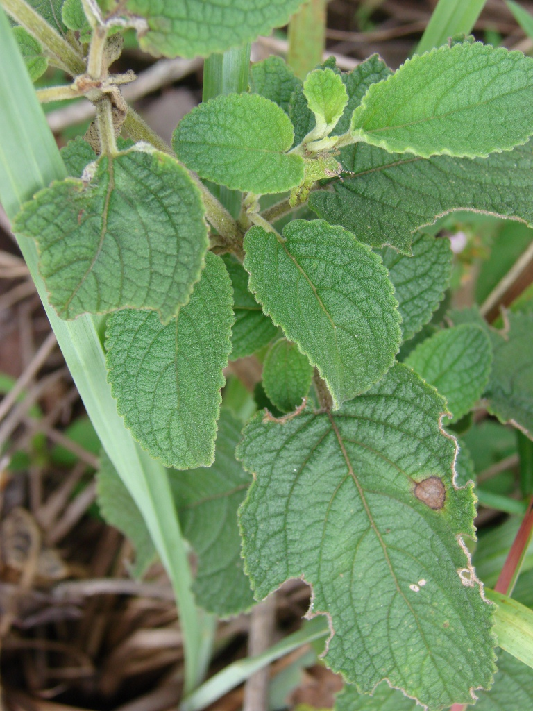 Eriope macrostachya Mart. ex Benth. - LAMIACEAE - Parque Estadual dos Pirineus - Pirenópolis - Goiás - Brasil.